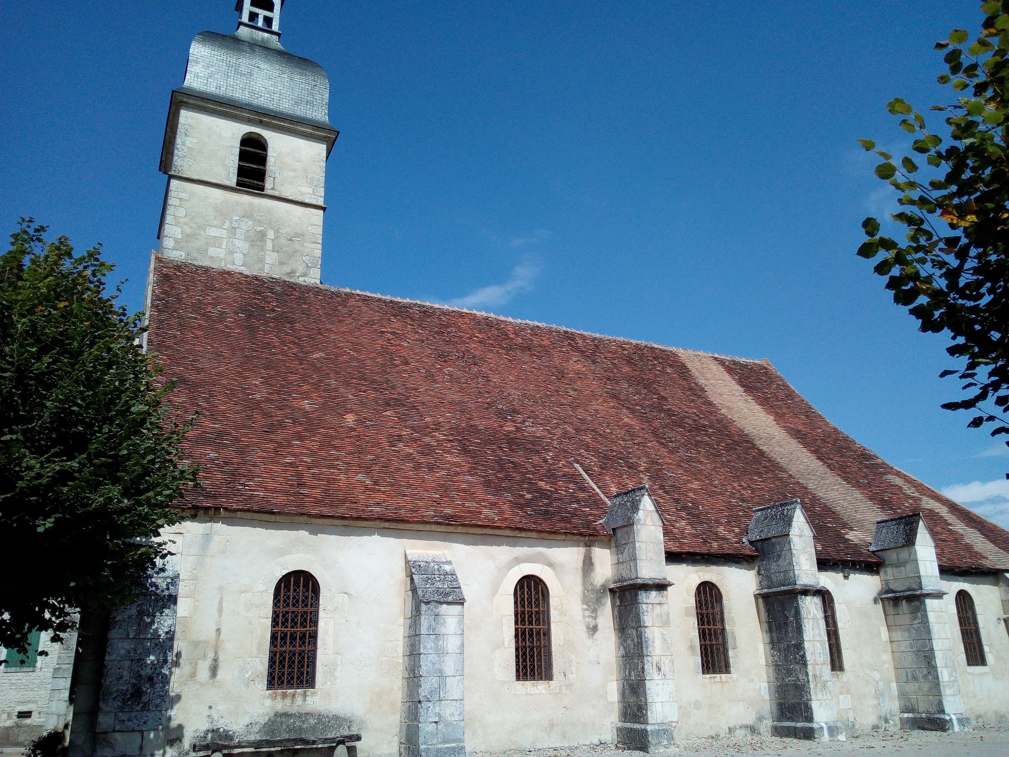 Ancienne Eglise Saint-Georges